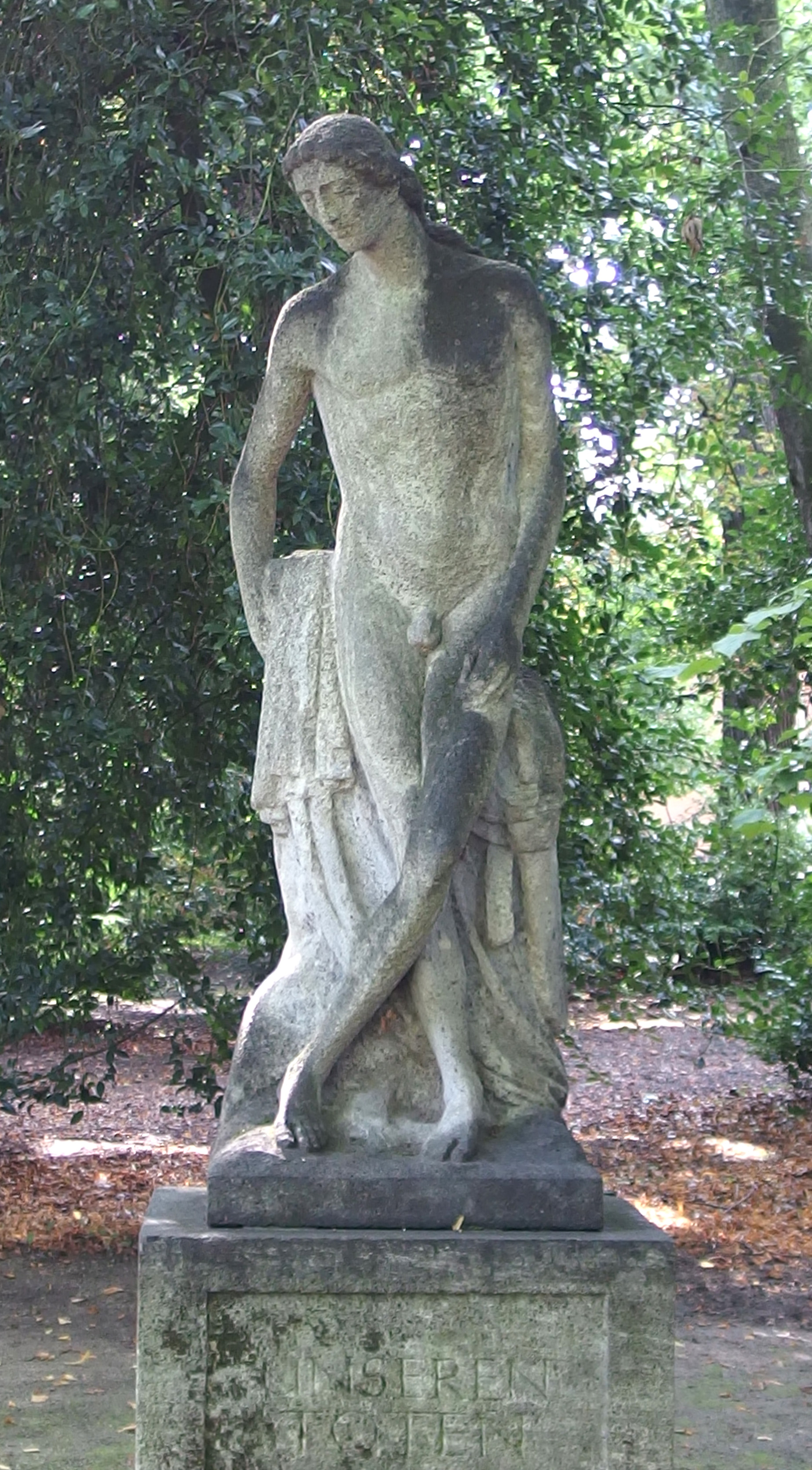 Das Ehrenmal zur Erinnerung an die Mitglieder und Freunde des Malkastens aus Stein wurde von dem Bildhauer Carl M. Geiling (1874-1924) geschaffen und am 24. Juli 1921 im Malkastenpark am Lindenrondell aufgestellt.